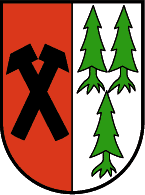 Dalaas, Vorarlberg: Im gespaltenen Schild vorn in Rot ein schwarzes gekreuztes Bergwerkshammerpaar und im silbernen Feld drei bewurzelte grüne Tannen. (Verleihung: 13. Jänner 1970)